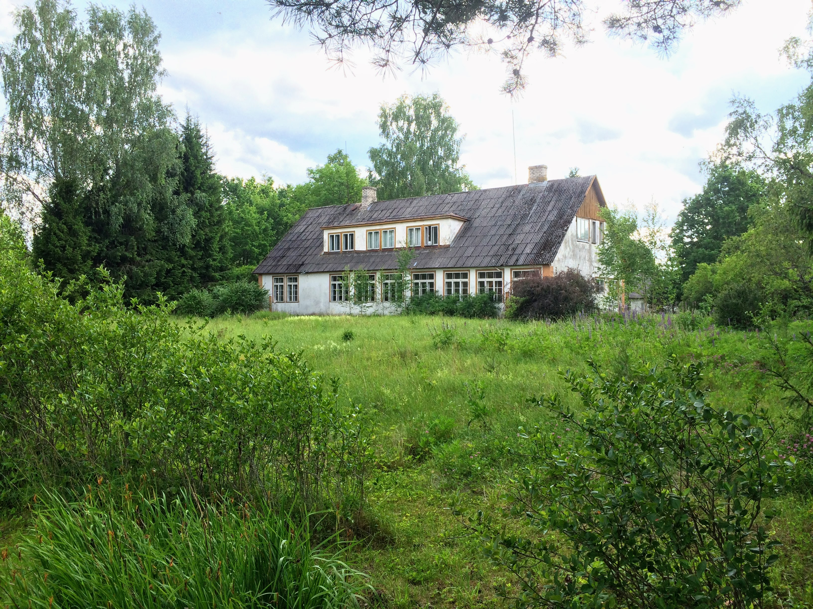 Krabi vana koolimaja